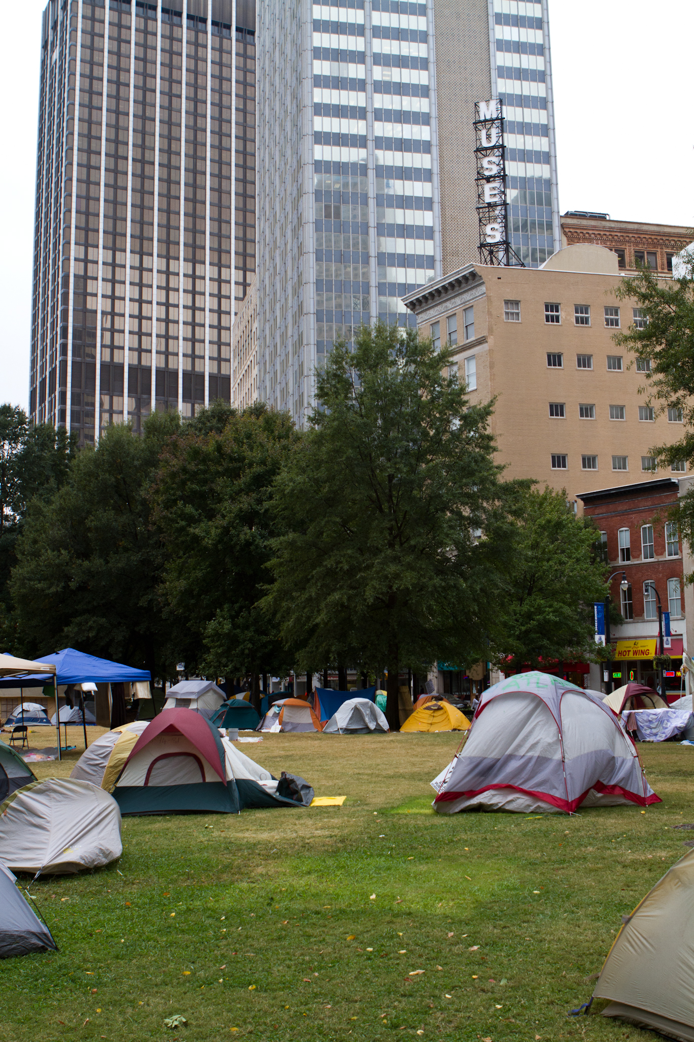 OCCUPY ATLANTA